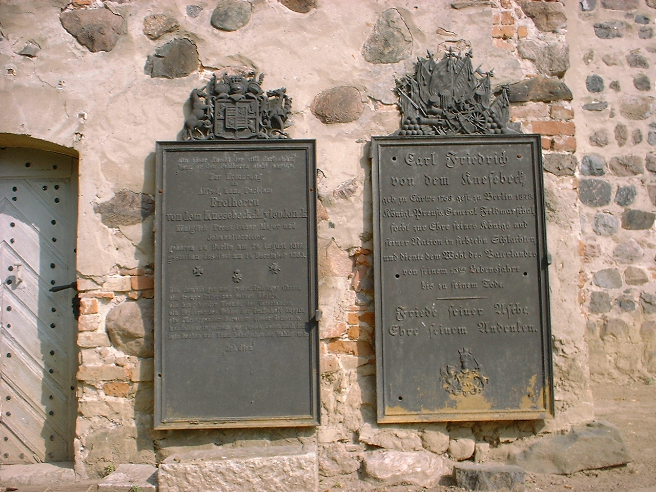 Knesebeck-Gedenktafeln an der Kirche in Neuruppin-Karwe in Brandenburg, Deutschland („Ein böser Knecht der still darf stehn, wenn er den Feldherrn sieht angehn. Zur Erinnerung an Alfred, Kuno, Paridam, Freiherrn von dem Knesebeck-Mylendonck, Königlich Preußischer Major und Johanniterritter, geboren zu Berlin am 29. August 1816, gestorben daselbst am 14. Dezember 1883. Ein demütiger und gottesfürchtiger Christ, ein treuer Untertan seines Königs, ein hingebender Freund des Vaterlandes, ein Förderer des Wohles der Grafschaft Ruppin, ein fürsorgender Berater dieser Gemeinde, handelte er in seinem gesegneten Leben nach dem sein Denken und Tun beherrschenden Wahlspruch: »Ich dien«“ und „Carl Friedrich von dem Knesebeck, geboren zu Carwe 1768, gestorben zu Berlin 1848. Königlich Preußischer General Feldmarschall, focht zur Ehre seines Königs und seiner Nation in 17 Schlachten und diente dem Wohl des Vaterlandes von seinem 13ten Lebensjahre bis zu seinem Tode. Friede seiner Asche, Ehre seinem Andenken.“)